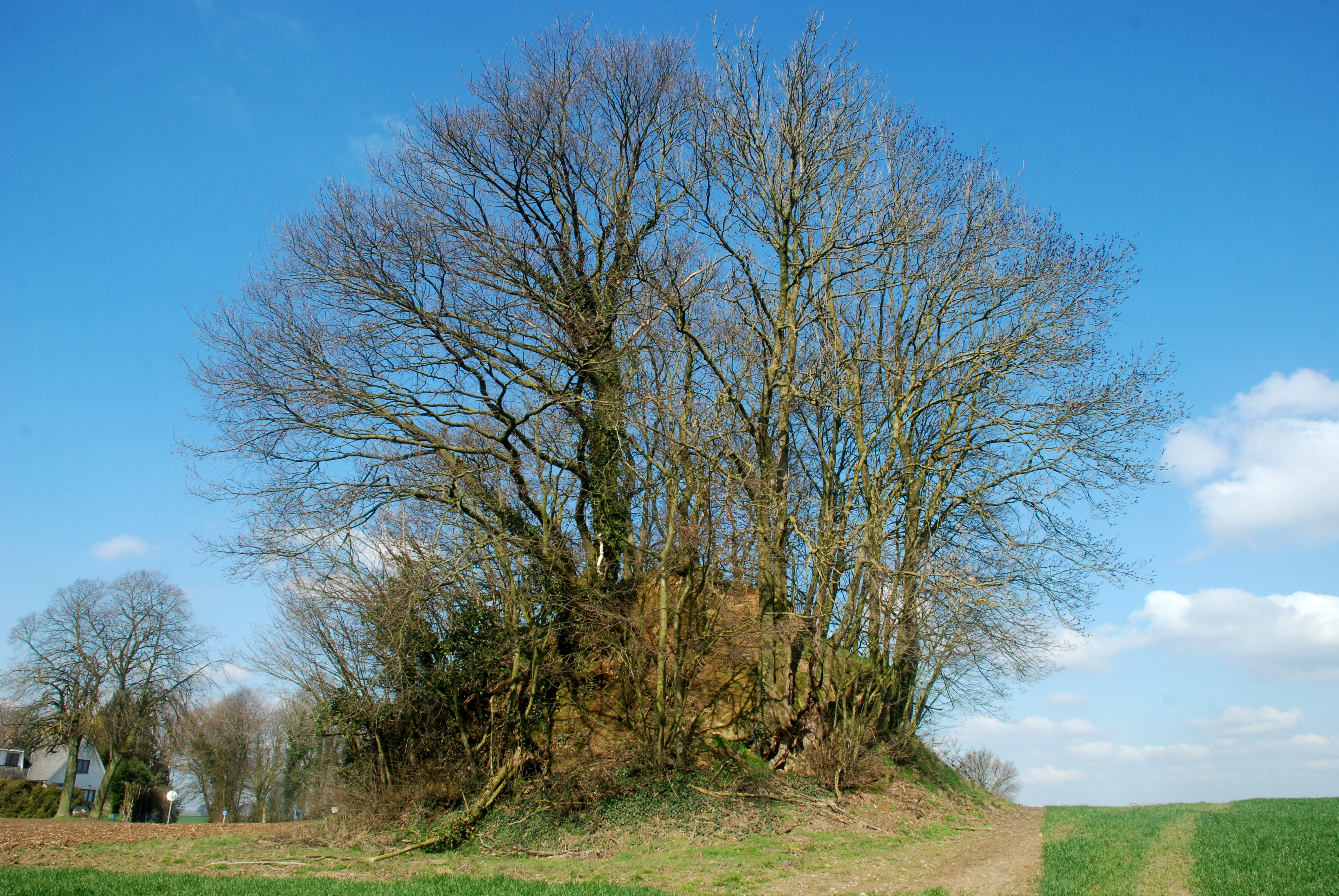 Belgique - Walhain - Tourinnes-Saint-Lambert - Tumuli de Libersart